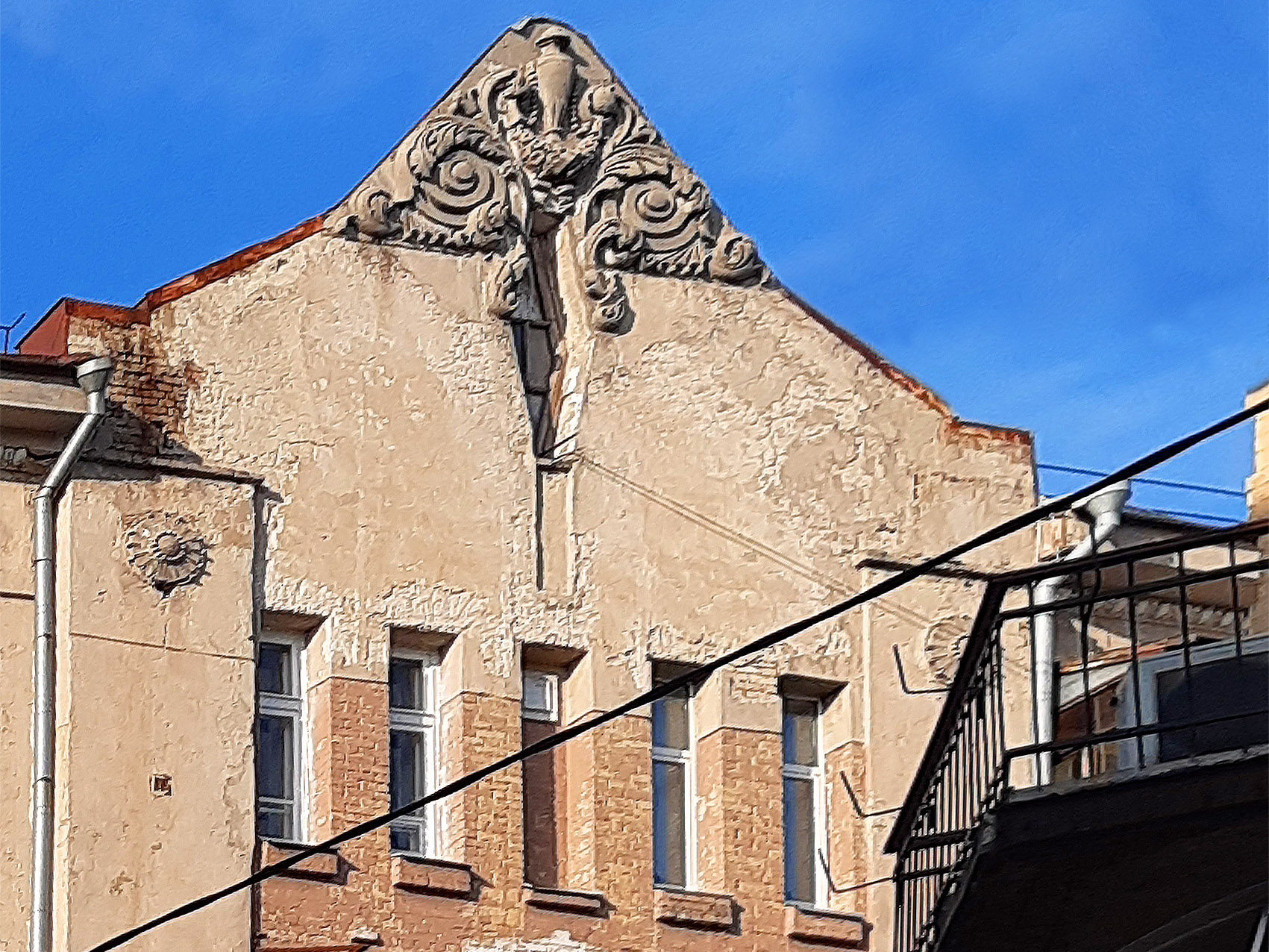 Прибутковий будинок, Київ, вулиця Рейтарська, 20/24